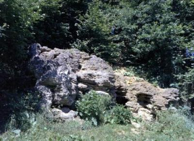 Klipper (frådsten eller kildekalk) i Grejsdalen ved Vejle